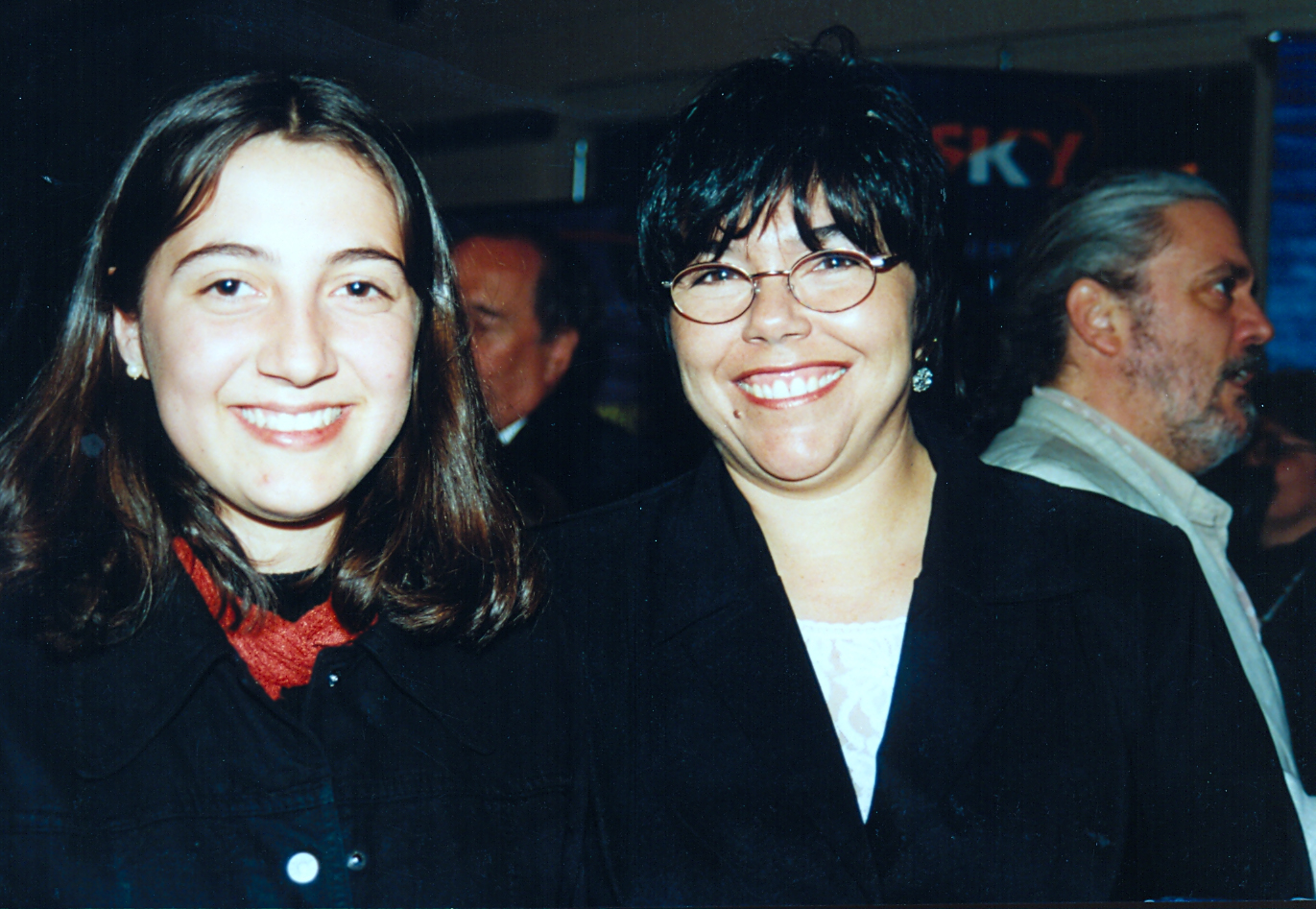 Actriz Malucha Pinto; Invitada especial; año 2002